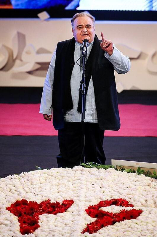 افتتاحیه سی‌وششمین جشنواره فیلم فجر - مراسم افتتاحیه سی‌وششمین جشنواره فیلم فجر شامگاه پنج‌شنبه ۱۲ بهمن ماه با حضور سیدعباس صالحی وزیر فرهنگ و ارشاد اسلامی و جمعی از هنرمندان و سینماگران در سالن همایش‌های برج میلاد تهران برگزار شد.